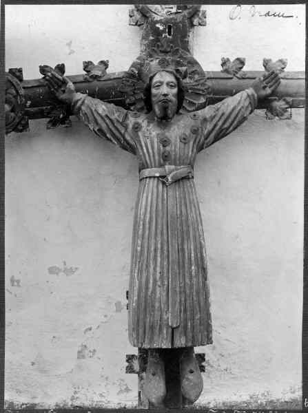 Triumfkrucifix, 1400-talets andra hälft. Efterbildning av Luccakrucifixet. Kategori: (05) KrucifixTriumfkrucifix, 1400-talets andra hälft. Efterbildning av Luccakrucifixet.